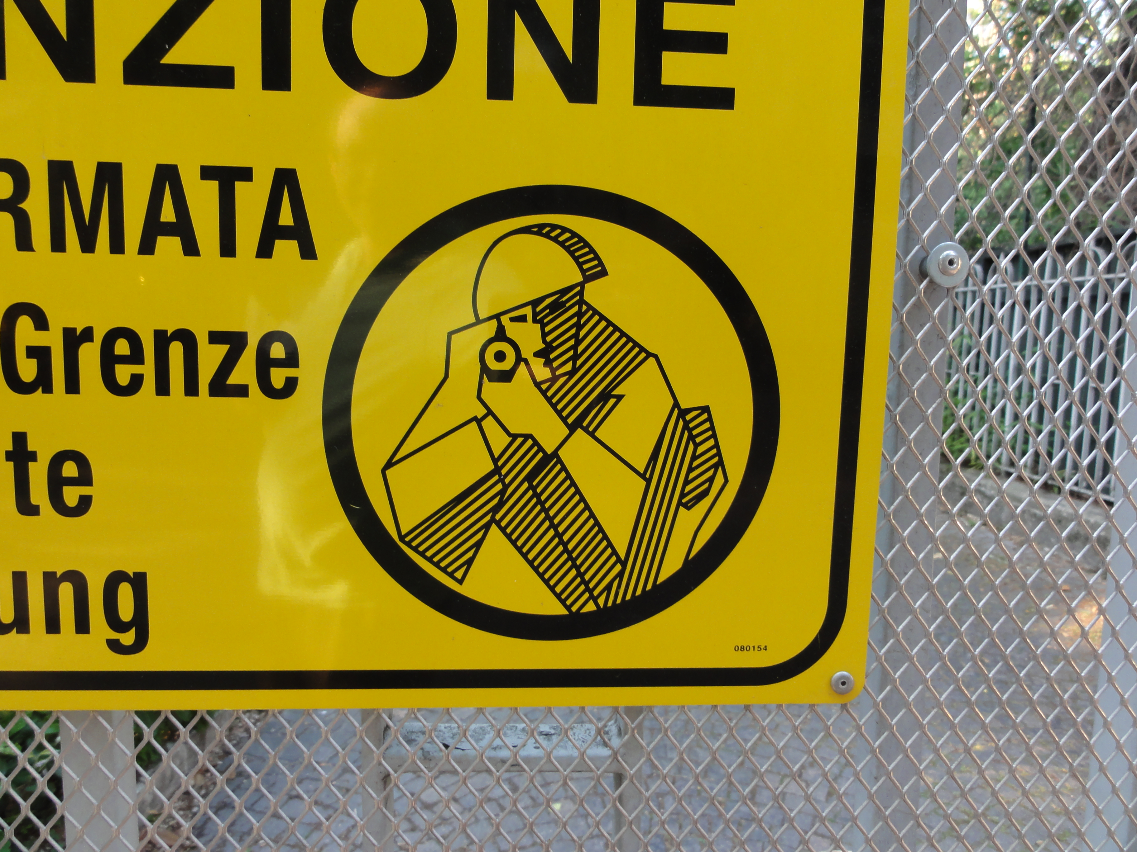 Bozen-Bolzano — Guardia di Finanza (Warnschild Schußwaffengebrauch)